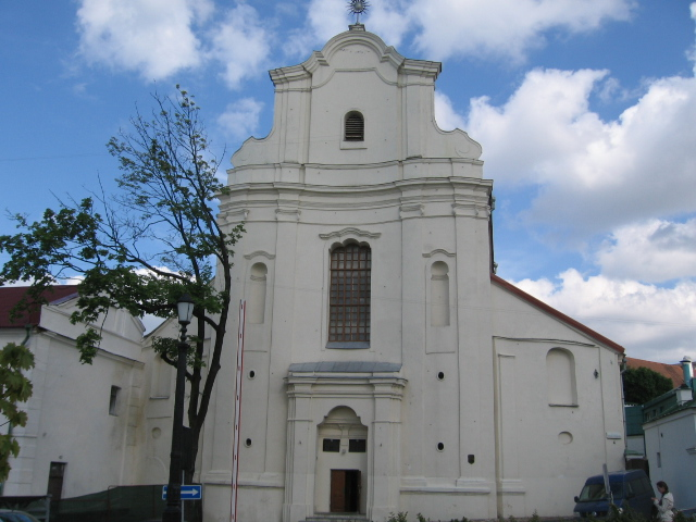 Kościół św. Józefa w Mińsku.